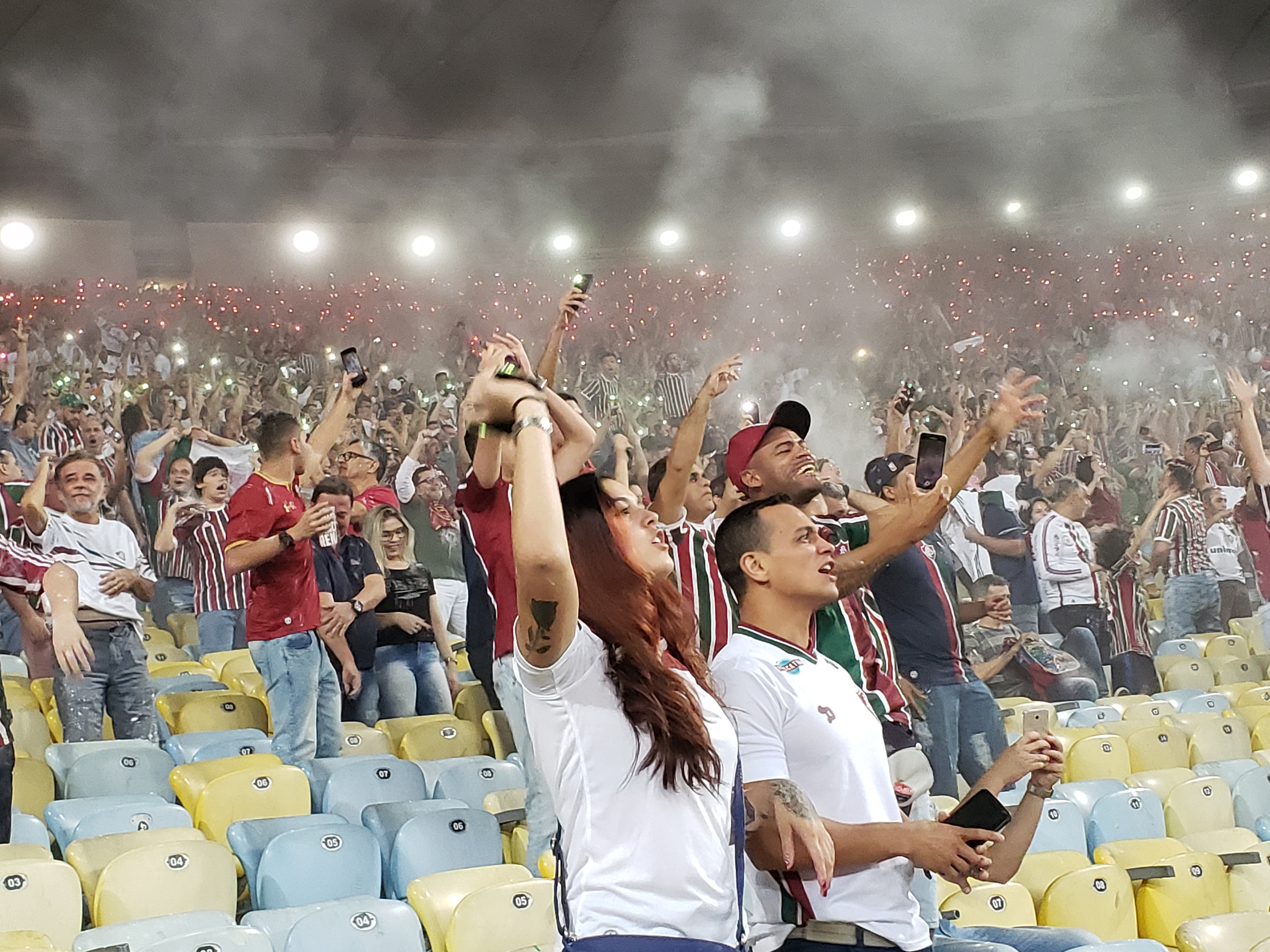 Torcida do Fluminense Football Club contra o Corinthians na Copa Sul-Americana de 2019, partida disputada no Maracanã em 29/08/2019 e que terminou empatada por 1 a 1.